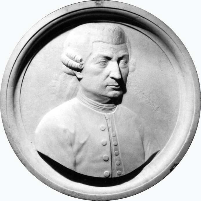 Medaglione di Giovanni Arduini, opera di Pietro Bearzi precedente al 1847. Il medaglione fa parte del Panteon Veneto, conservato presso Palazzo Loredan di Campo Santo Stefano a Venezia.